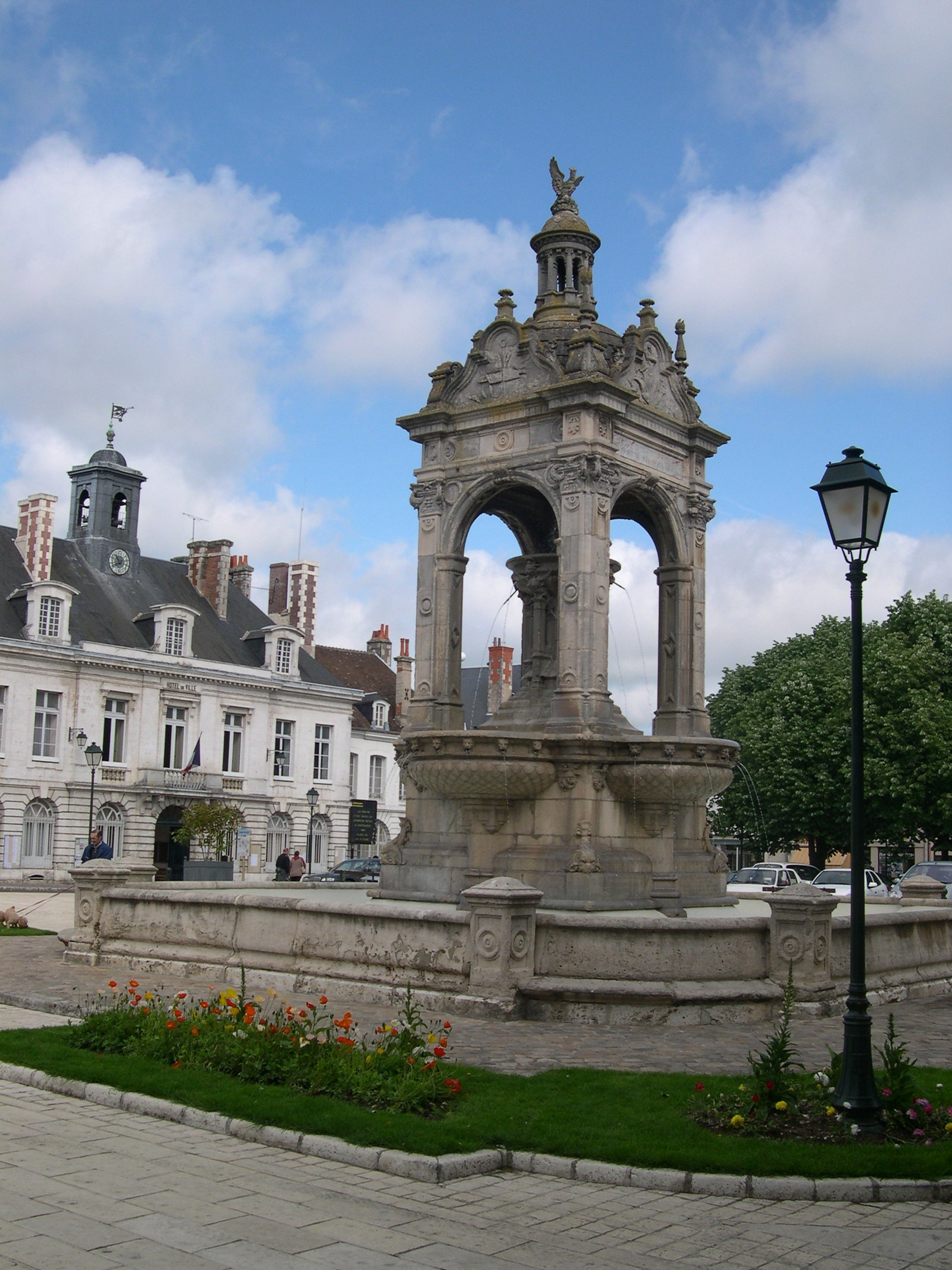 France, Eure-et-Loir, Châteaudun, Place du dix-huit octobre.